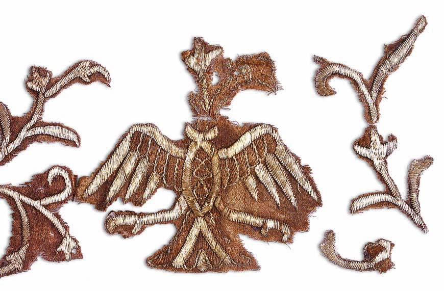 Двоглави орао урађен у златовезу из цркве Свете Петке у Станичењу